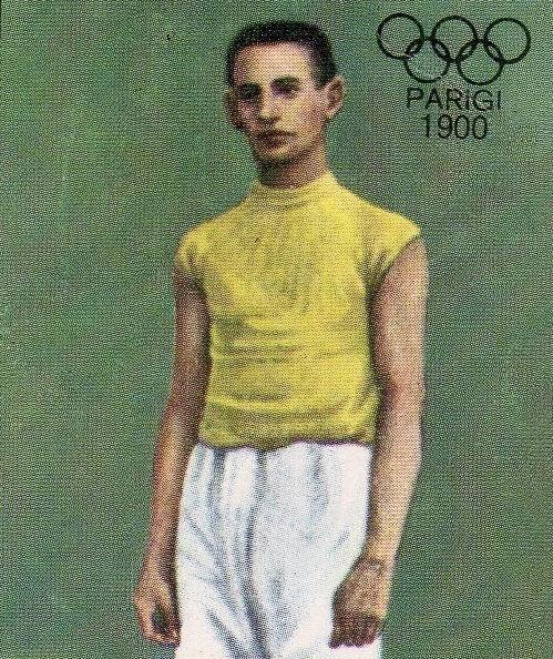 Michel Théato en 1900 - Campioni dello Sport 1968-1969, n°399